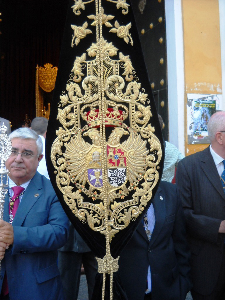 Escudo que aparece en el bacalao de la Hermandad